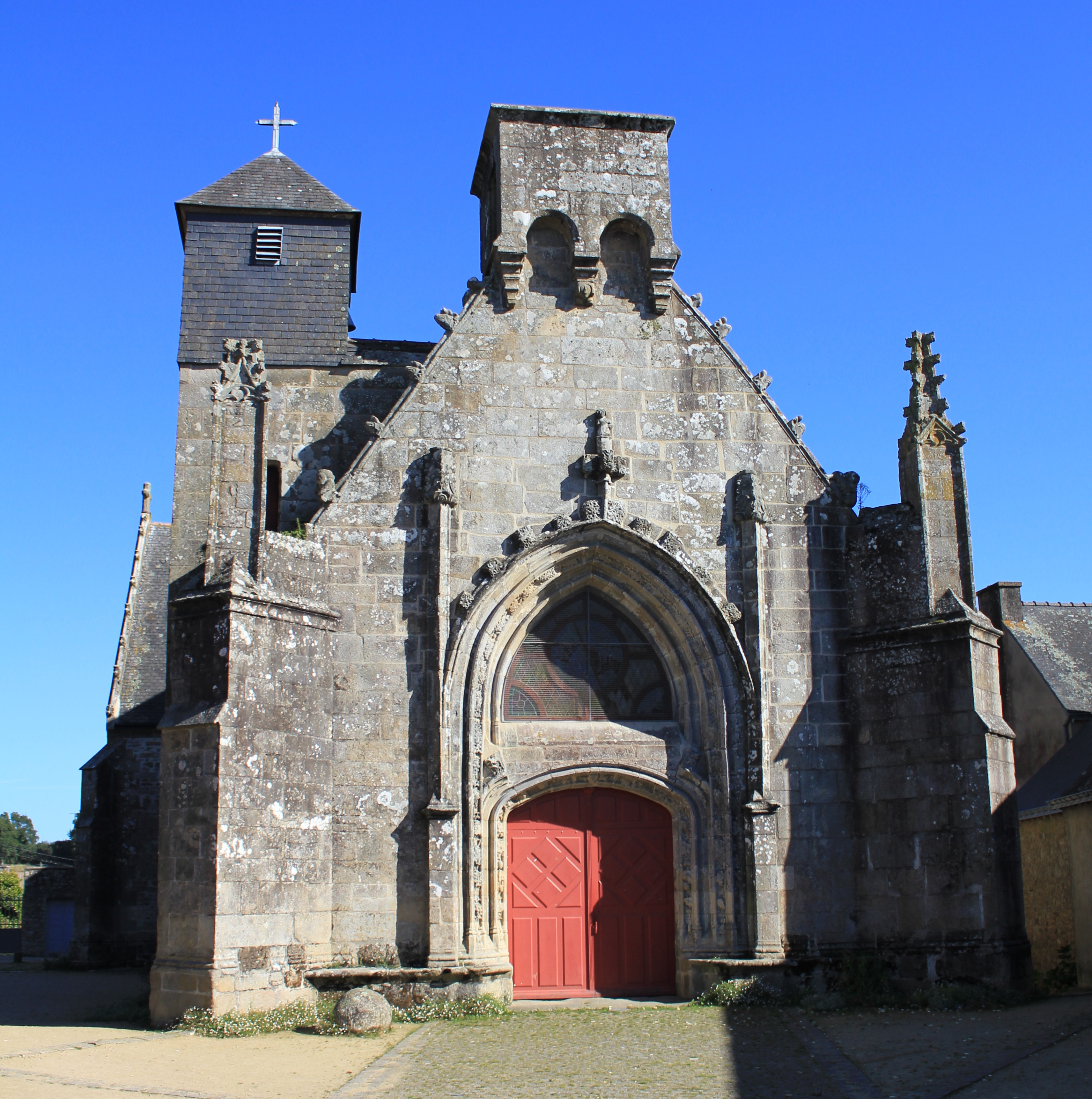 Église Saint-Théleau (Landaul) : vue générale .